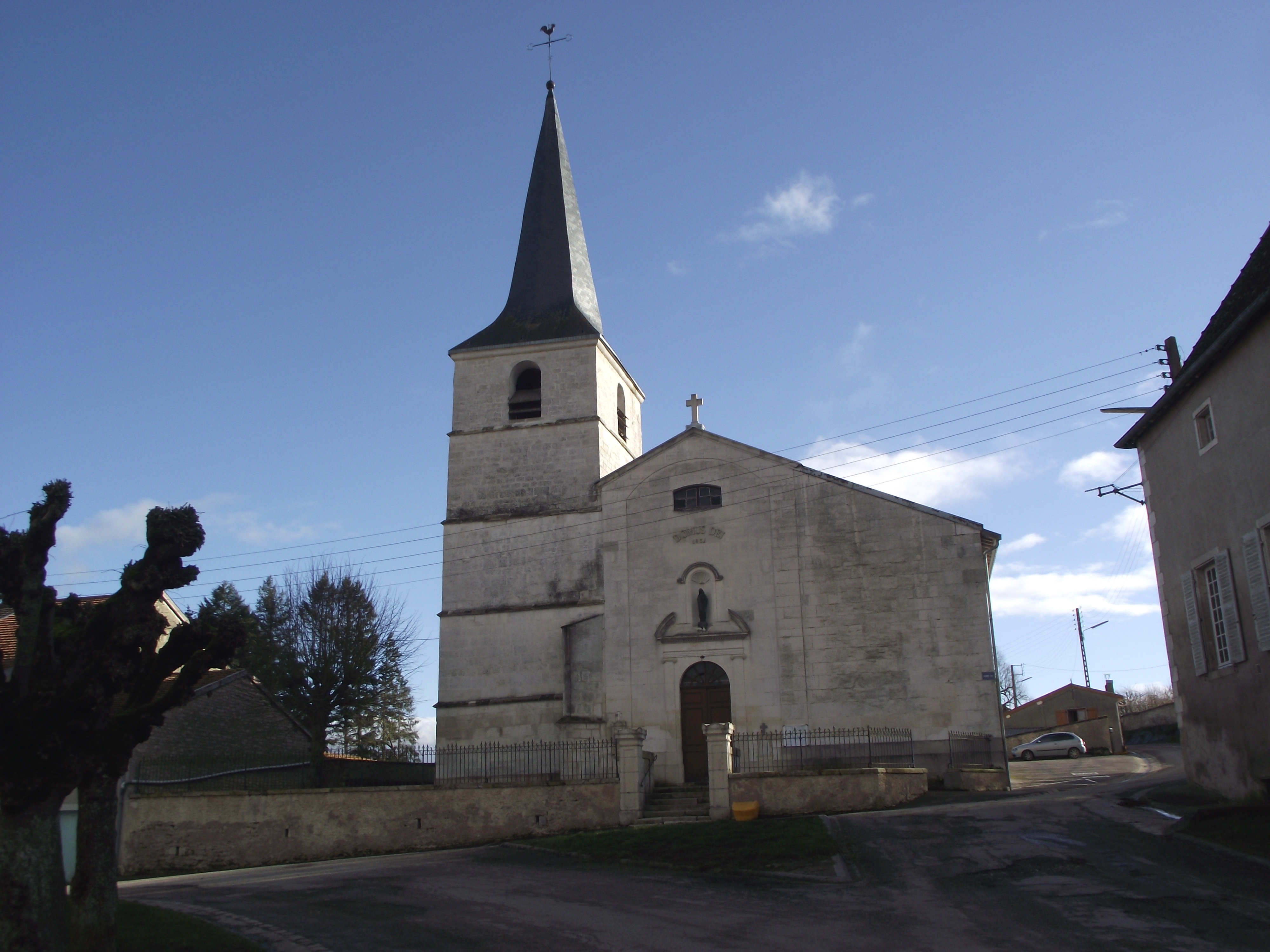 Eglise de la Nativité, 17ème.